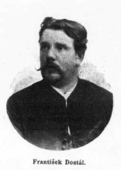 František Dostál (1855-1921), rakouský a český rolník a politik